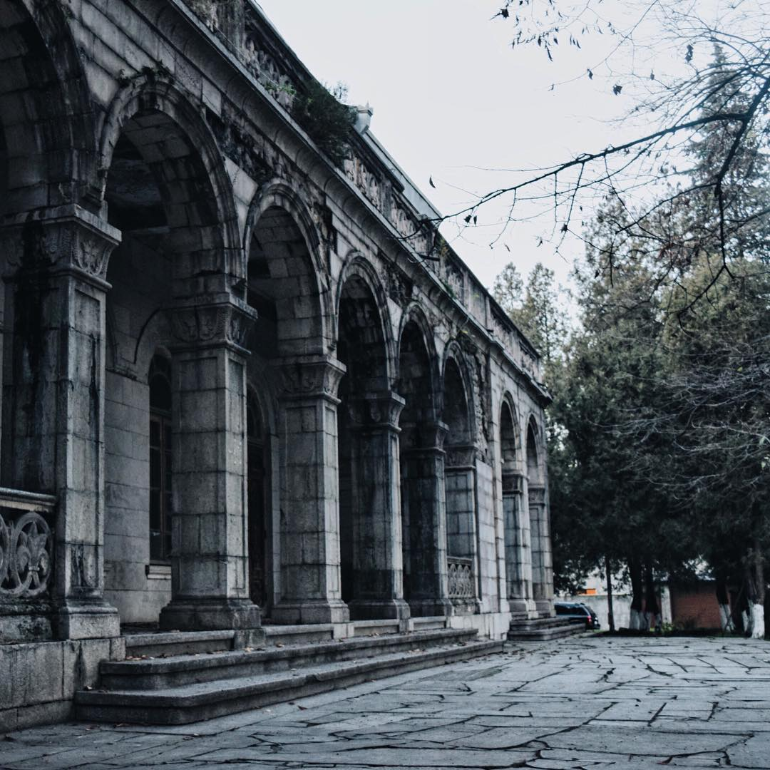 Ստեփանակերտի թատրոնի շենք